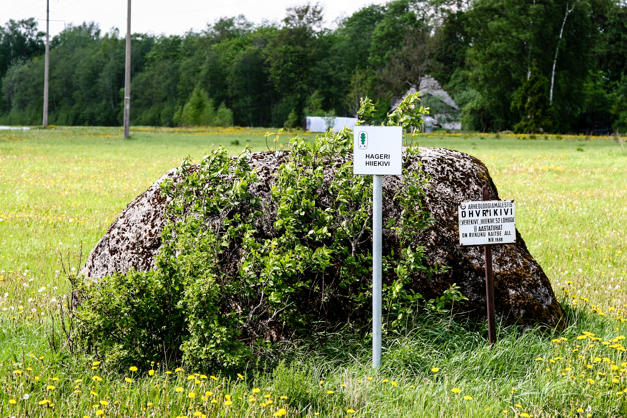 Hageri hiiekivi